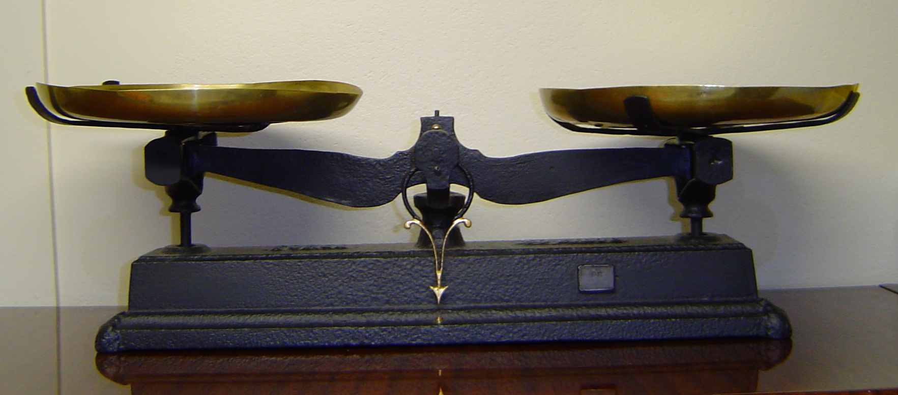 Photo personnelle de ma collection